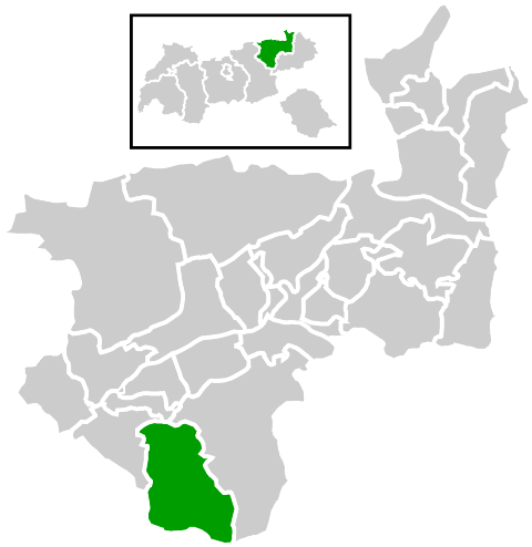 Lage der Gemeinde innerhalb des Bezirks Kufstein